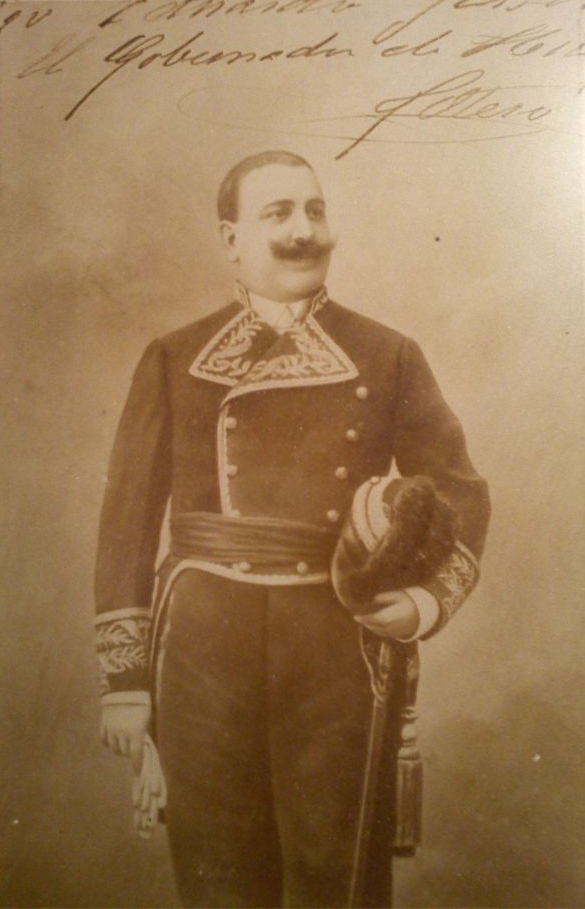 Joaquin Otero Barcena de la Concha con uniforme de Gobernador Civil de la Provincia de Huesca fotografiado en 1913